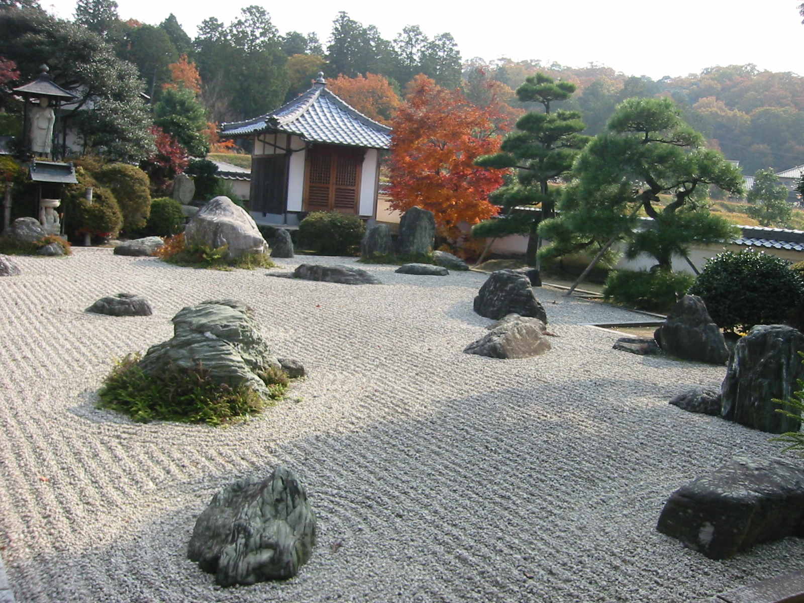 播磨 東条町 安国寺 枯山水 石庭